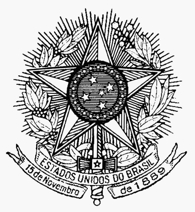 Brasão de Armas dos "Estados Unidos do Brasil", que foi o nome oficial do país de 1889 até 1967.